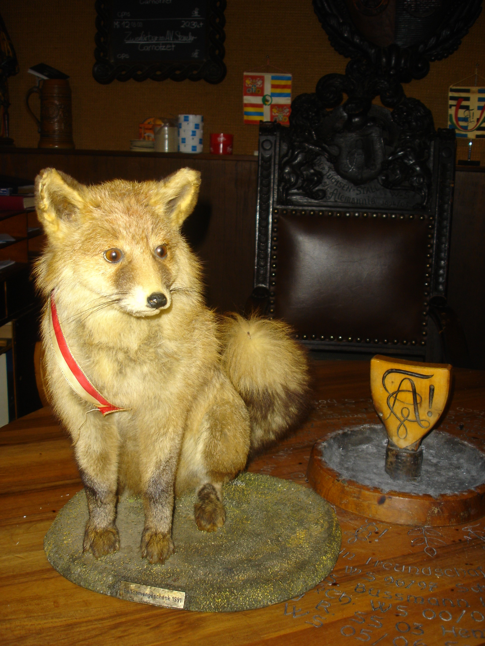 Fuchse Archibald